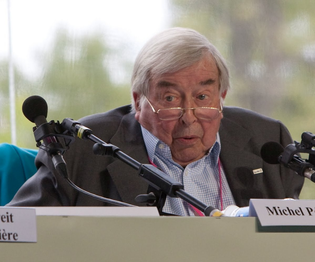 Pierre Bellon à l'université d'été du MEDEF en 2009.